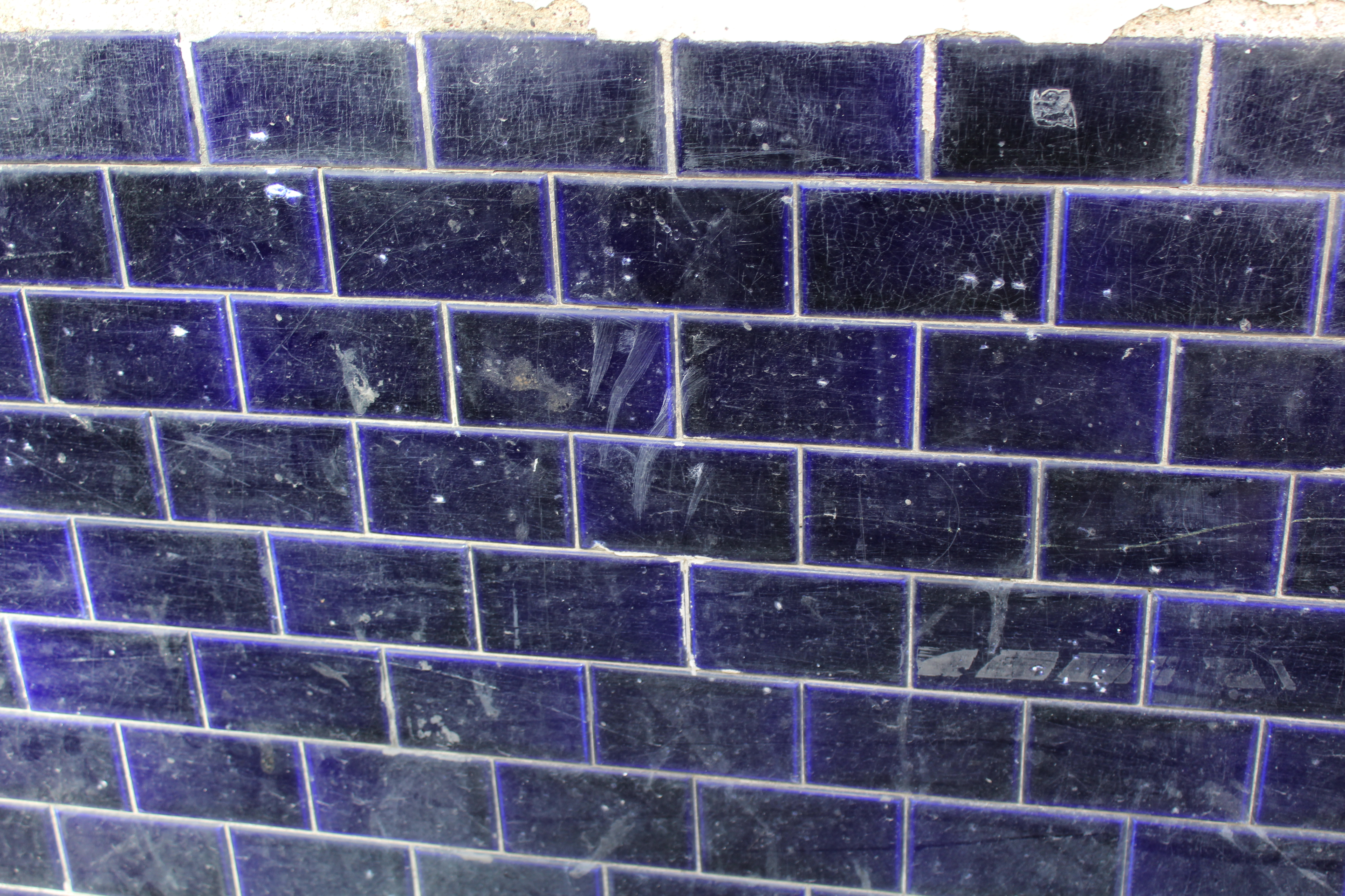 Kafelki na fasadzie kamienicy nr 23 przy ul. Łokietka w Szczecinie